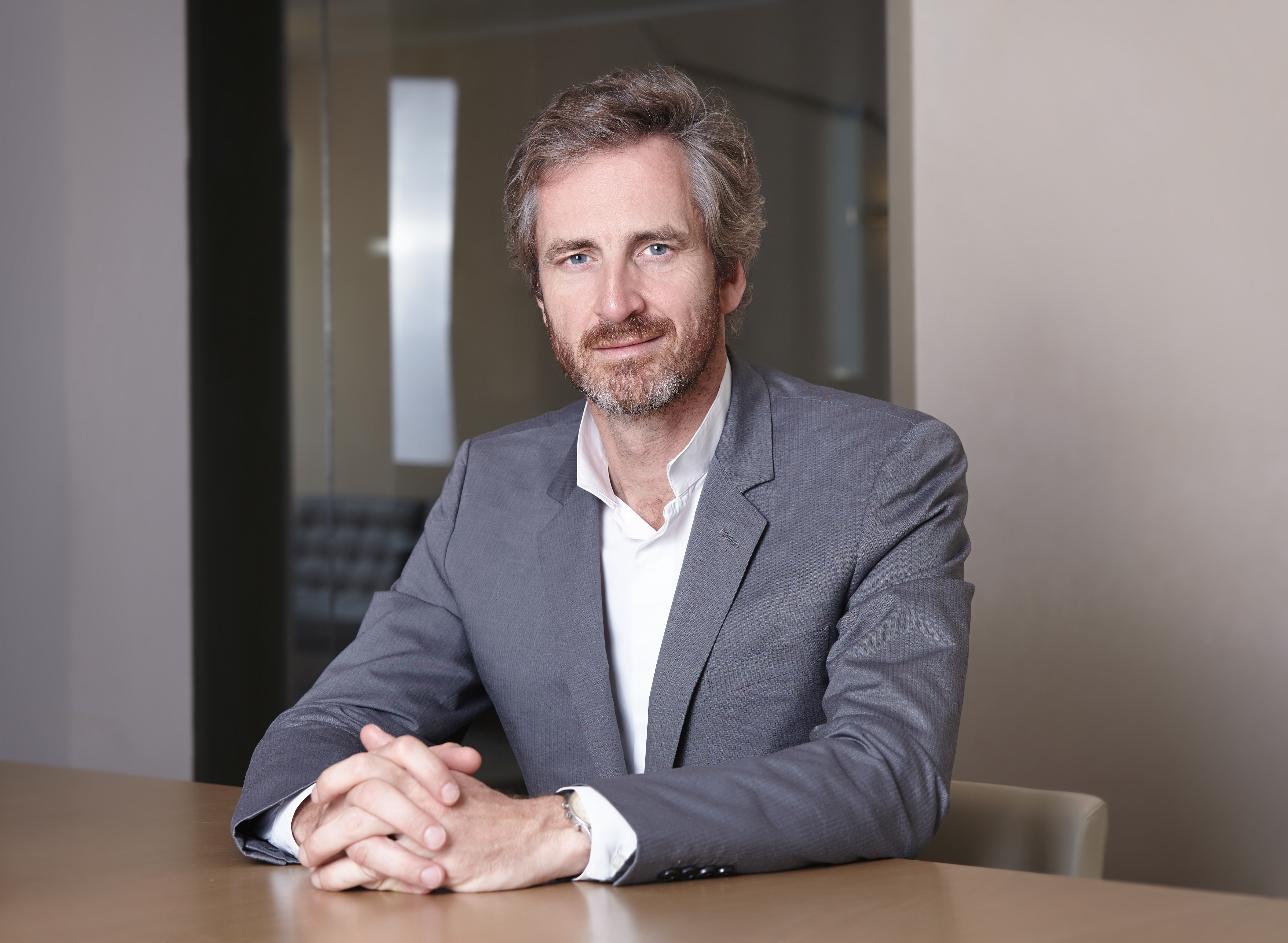 Frédéric Jousset, dans les locaux du siège de Webhelp Groupe